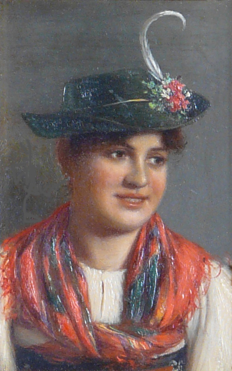 Trachtenmädchen - Porträt einer jungen Frau in alpenländischer Tracht mit blumengeschmücktem Hut